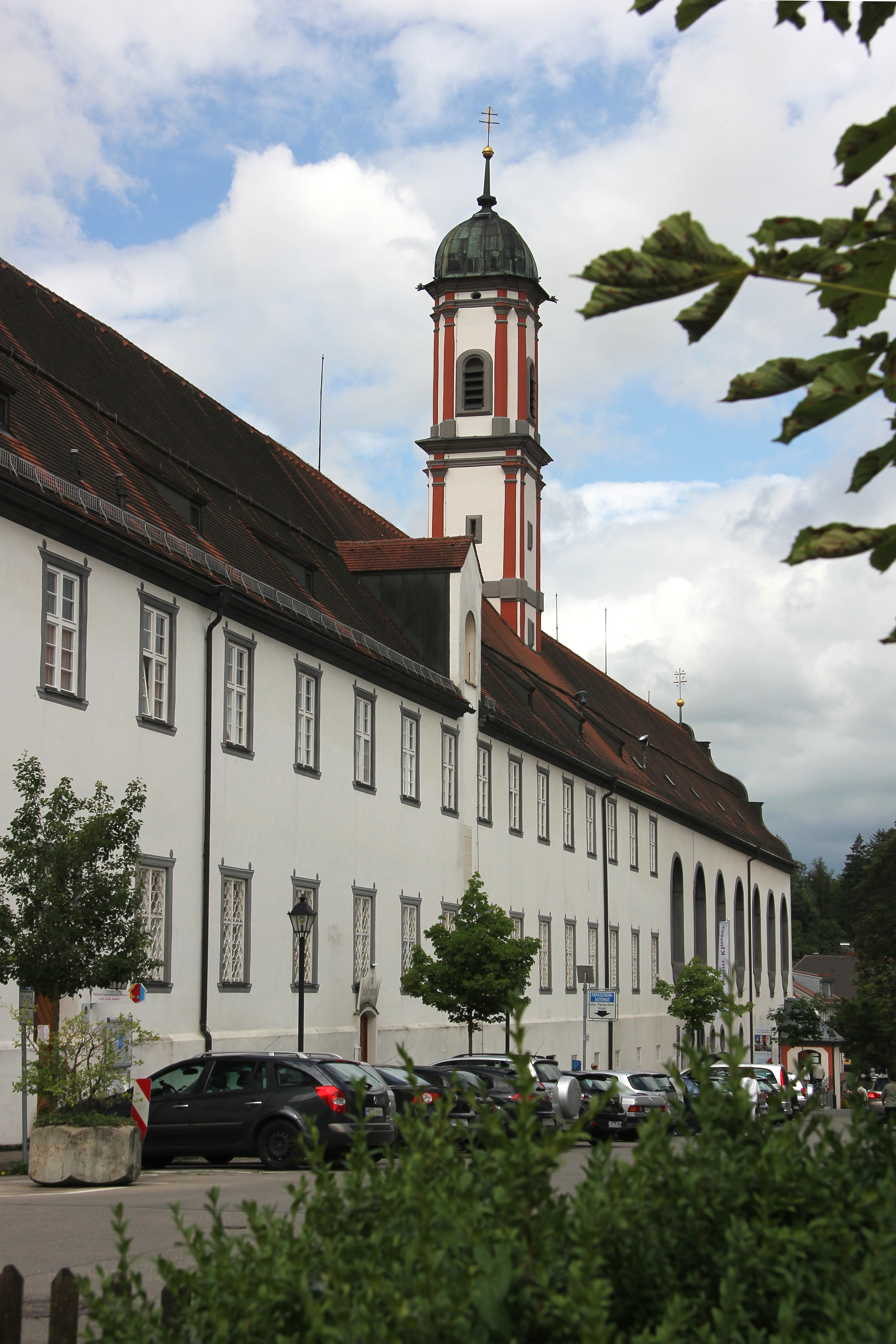 Dominikanerinnenkloster Bad Wörishofen, Nordseite